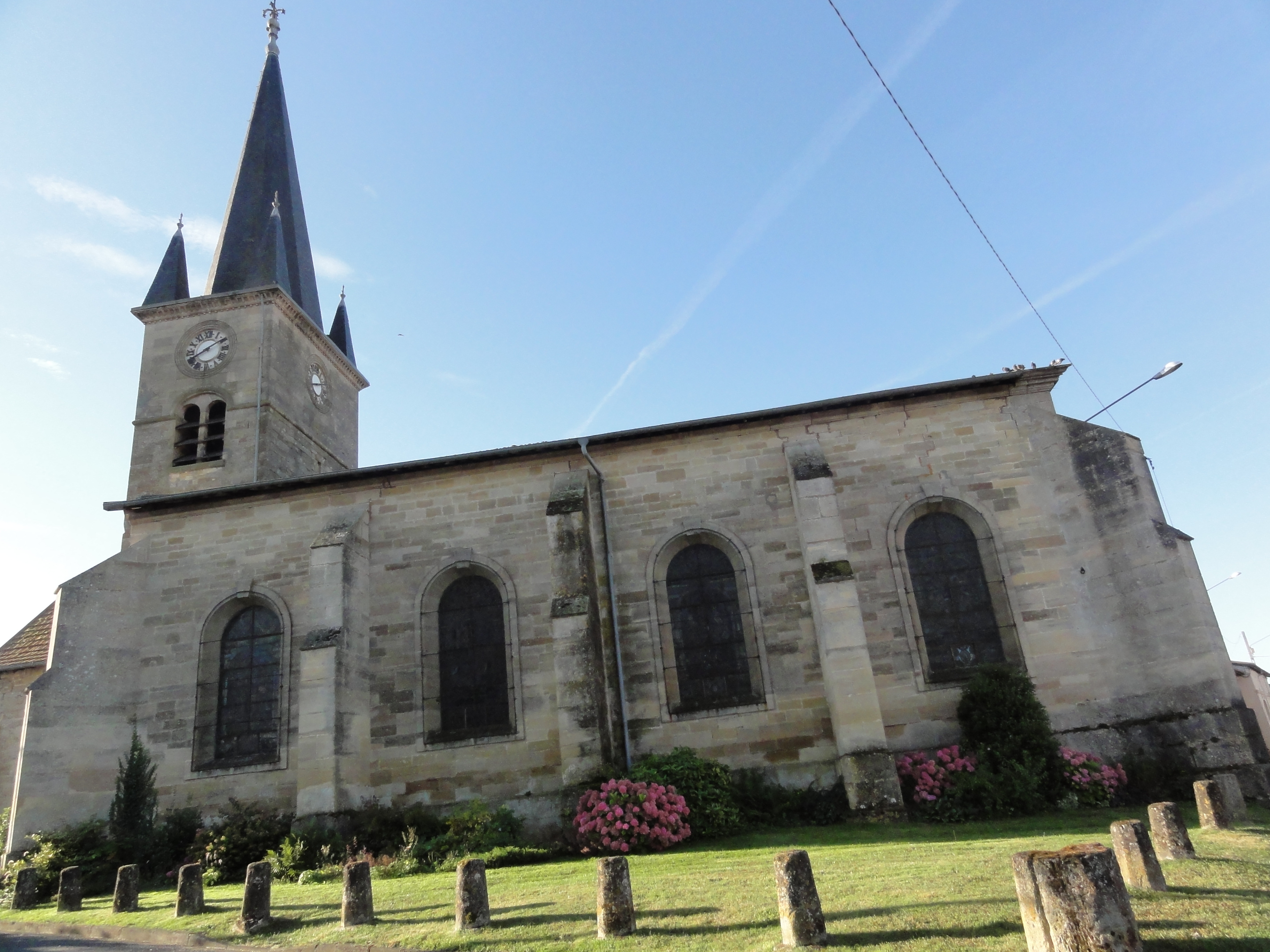 Brillon-en-Barrois (Meuse) église